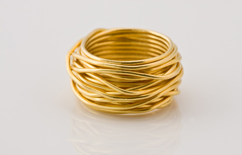 Ein handgezogener Goldfaden, der zu einem Ring gewickelt wird.